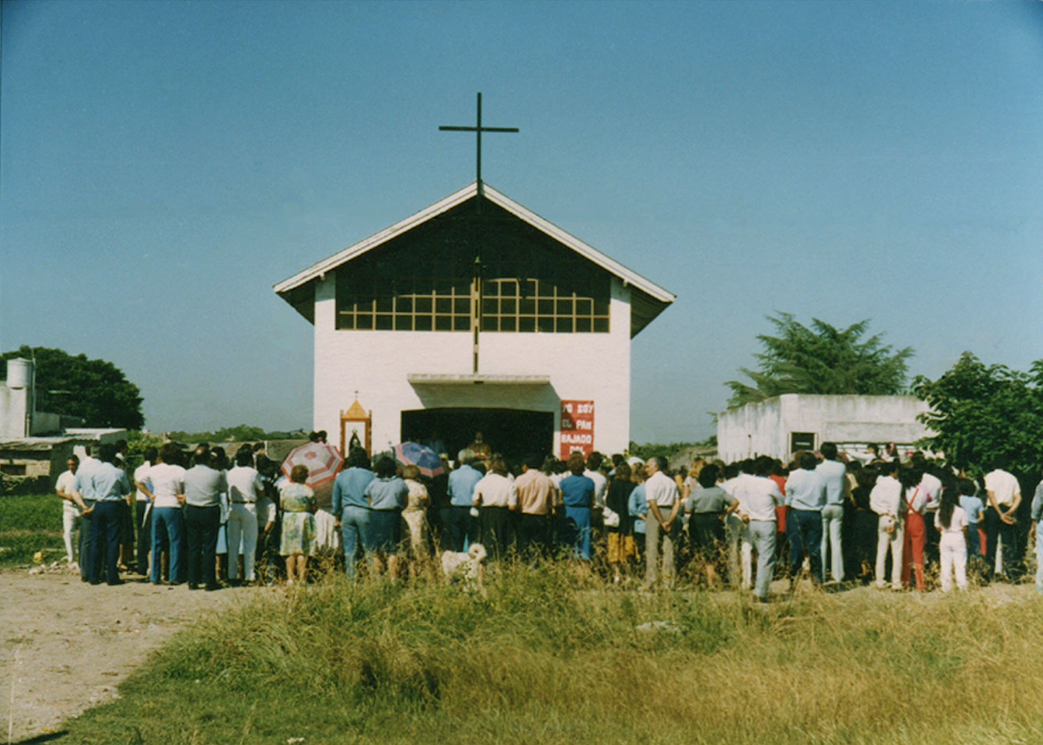 Parroquia Virgen de Caacupé de Berazategui bendición de la iglesia el 9 enero 1983